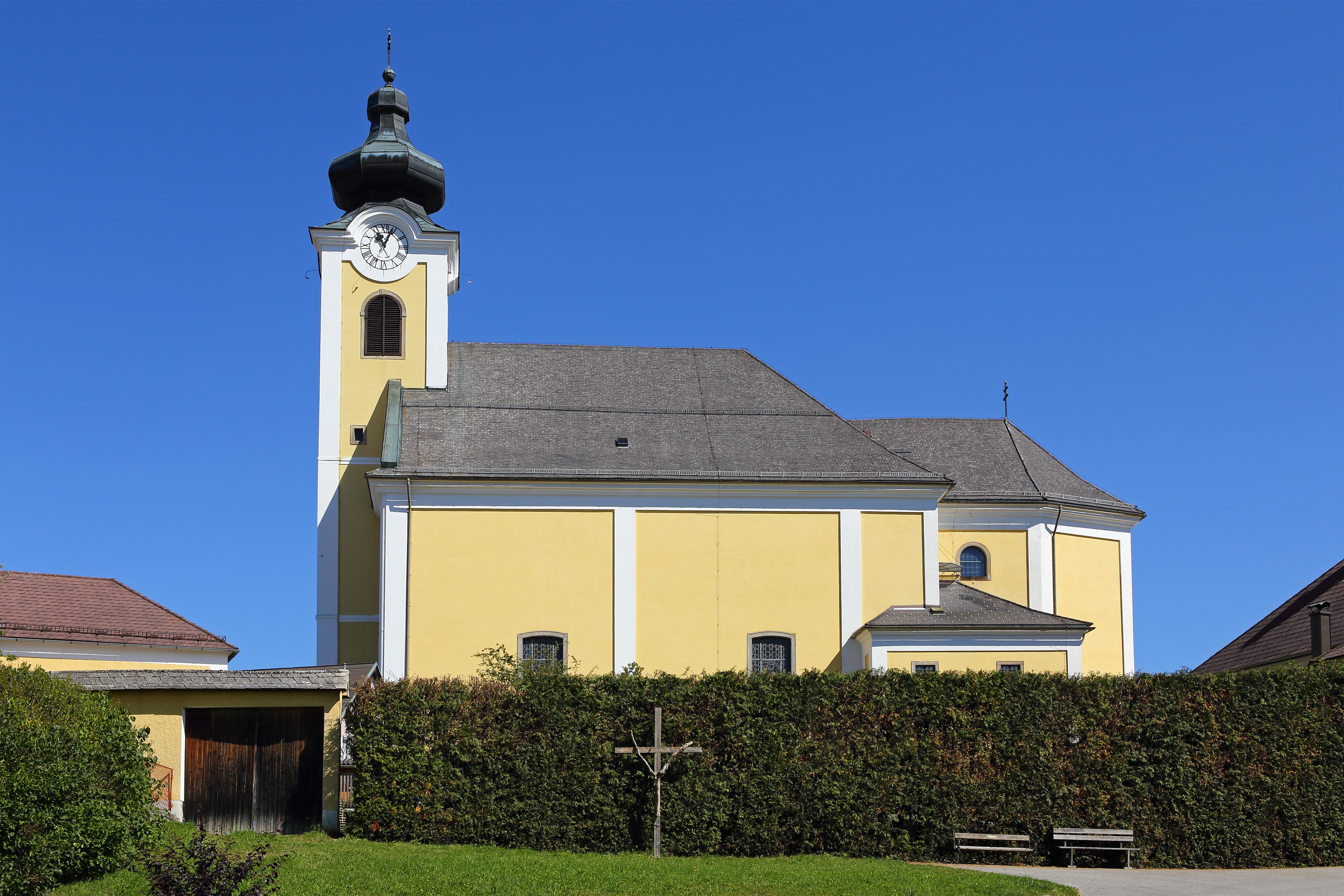 Kath. Pfarrkirche hl. Ägydius in Arbesbach - Südansicht